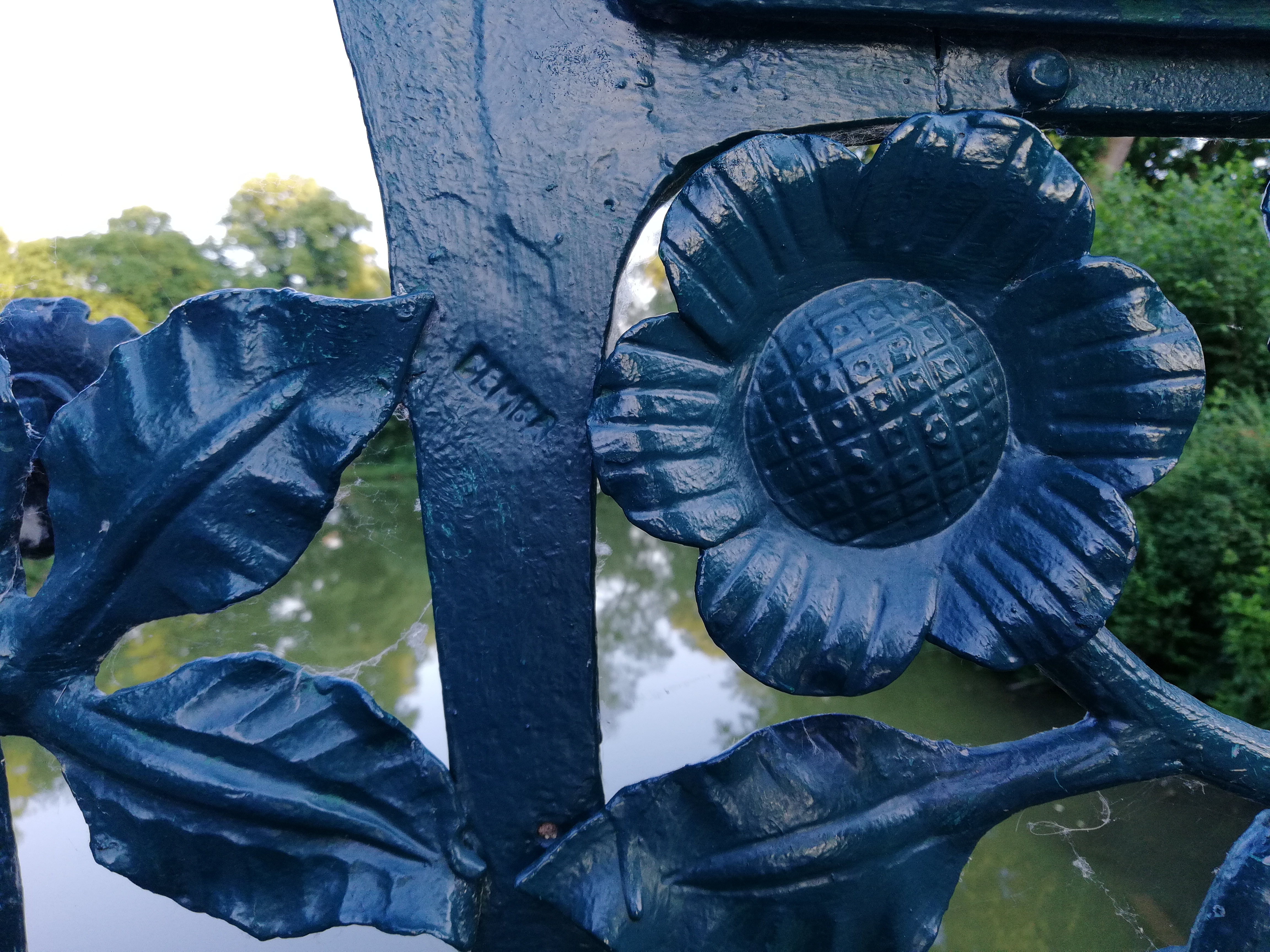 Ein gut für Eltern mit ihren Kindern geeignetes Sachensuchen- oder Sachenfinden-Spiel: 1907 in das Schmiedeeisen eingeschlagener Stempel der Schlosserei von Rudolf Bemba, der seinerzeit im Parterre des Gebäudes unter der Adresse Clevertor 2g die heute denkmalgeschützten Ziergitter für die Maschpark-Brücke geschaffen hat ...